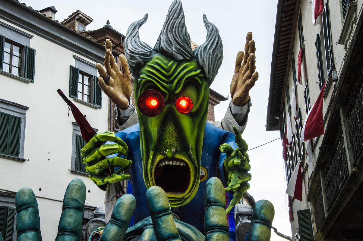 Carro del Cantiere Bombolo al Carnevale di Foiano della Chiana 2015